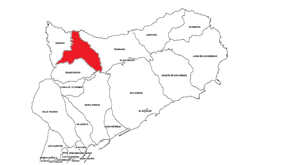 Localización de Afur